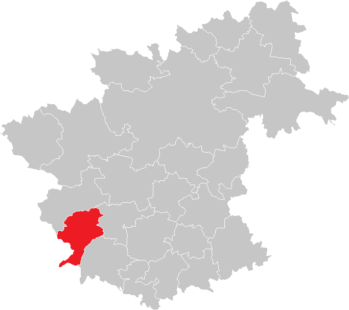 Bezirk Zwettl